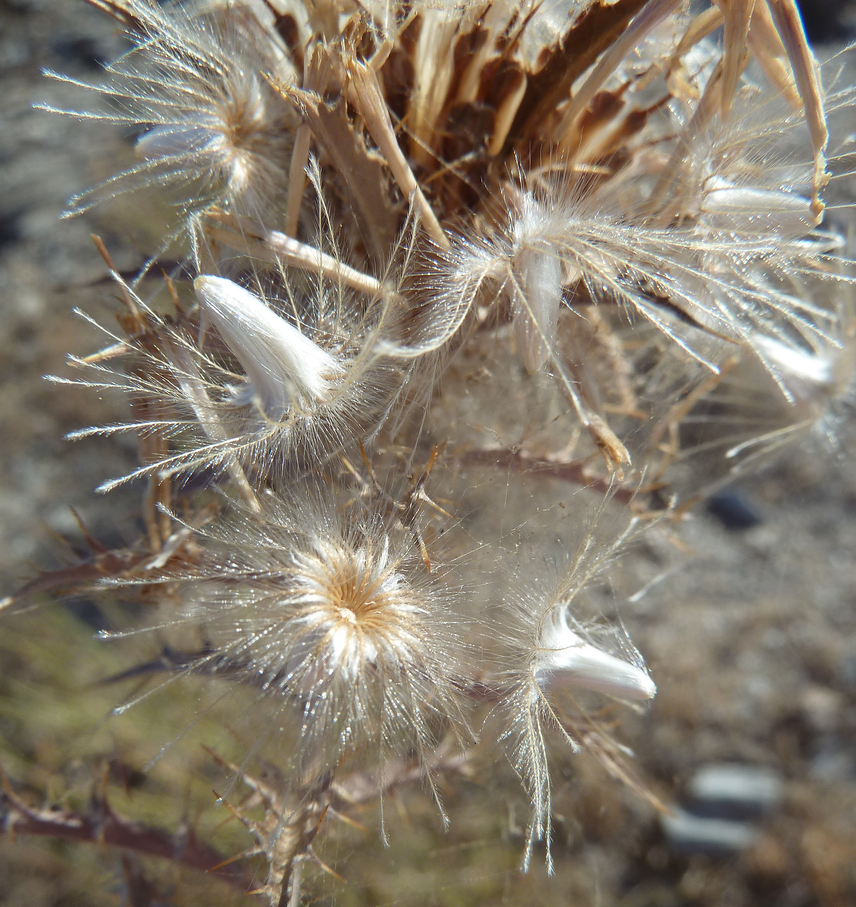 Atractylis humilis (Cardo heredero) : cipselas sub in situ - circa Circunvalación Norte , Águilas (Provincia de Murcia, España.)